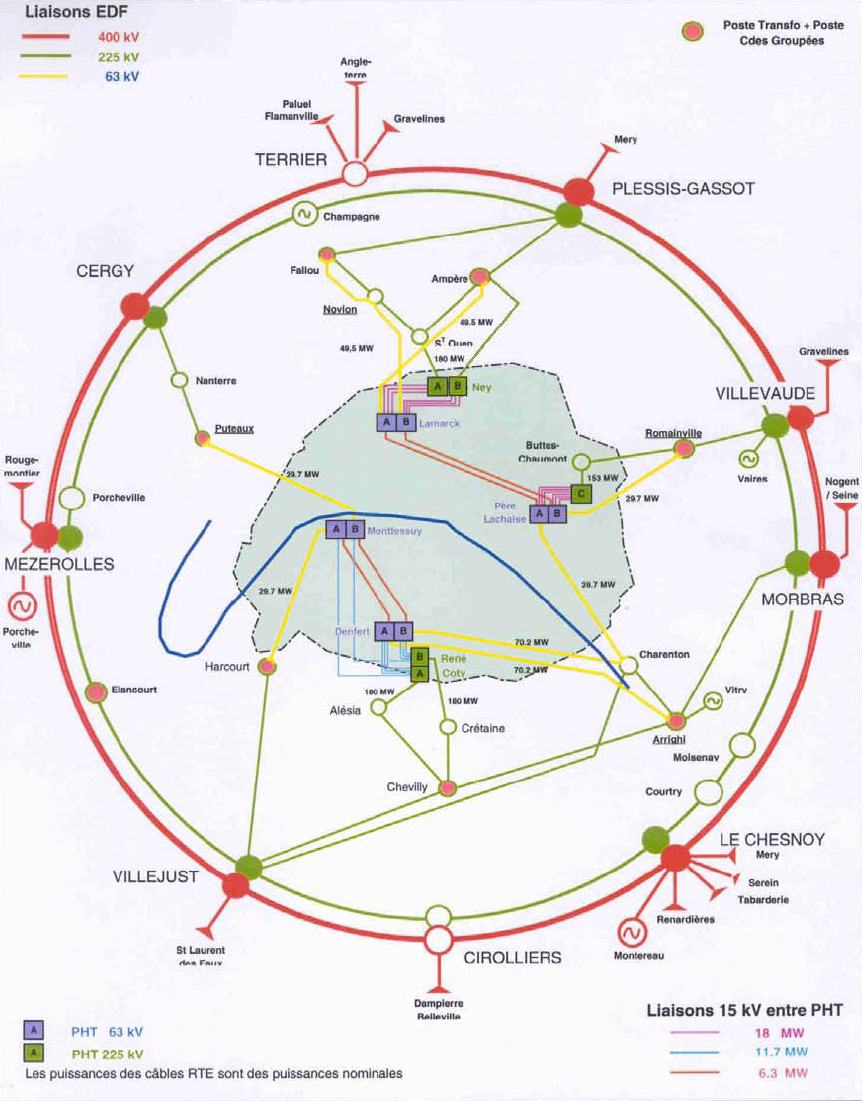 Schéma d'alimentation électrique des postes haute tension de la RATP par RTE (réseau de transport d'électricité). Alimentation électrique du métro de Paris.